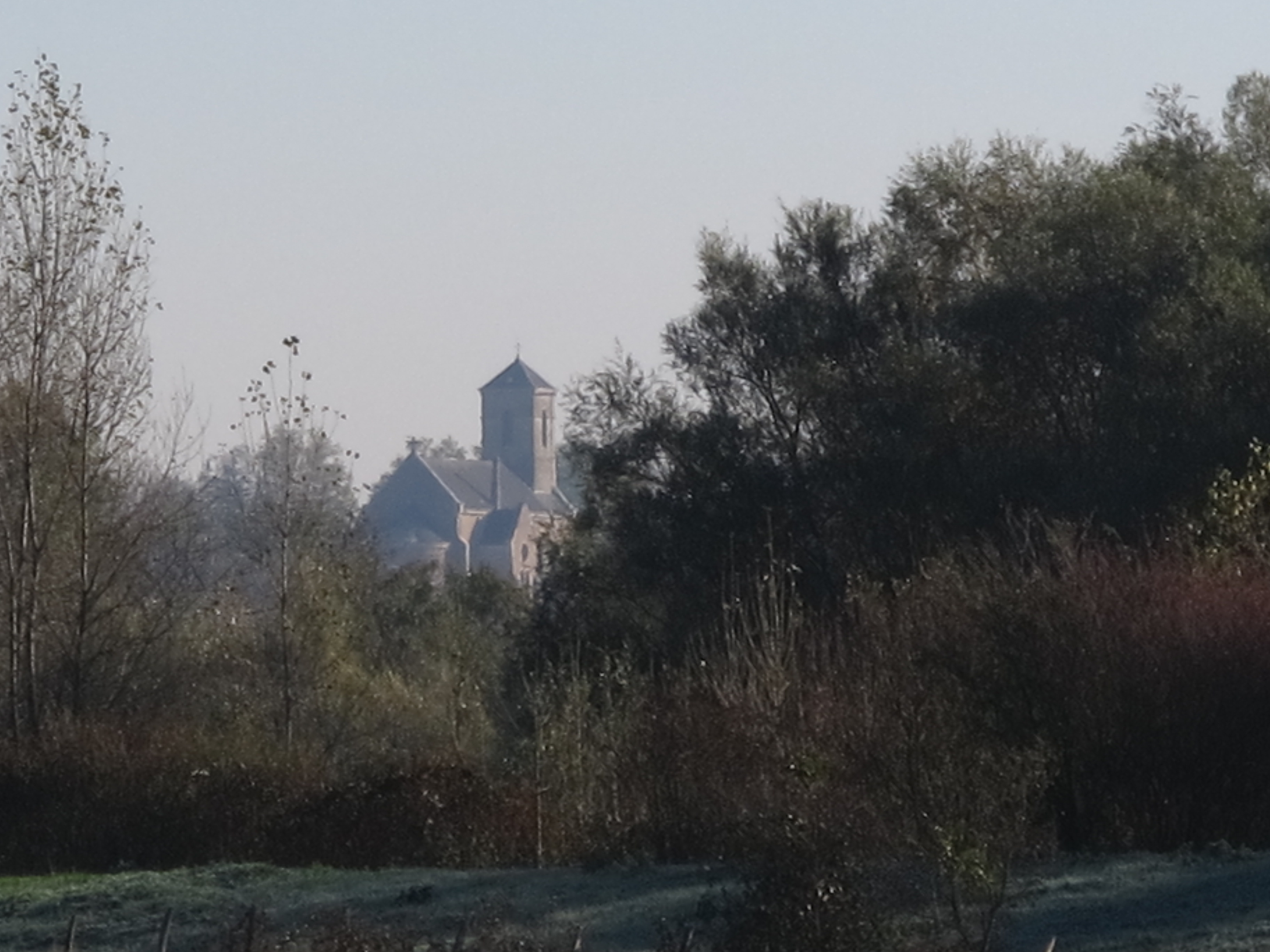 Eglise de La Bedugue (département du Jura) vue depuis le bord de la rivière le Doubs.